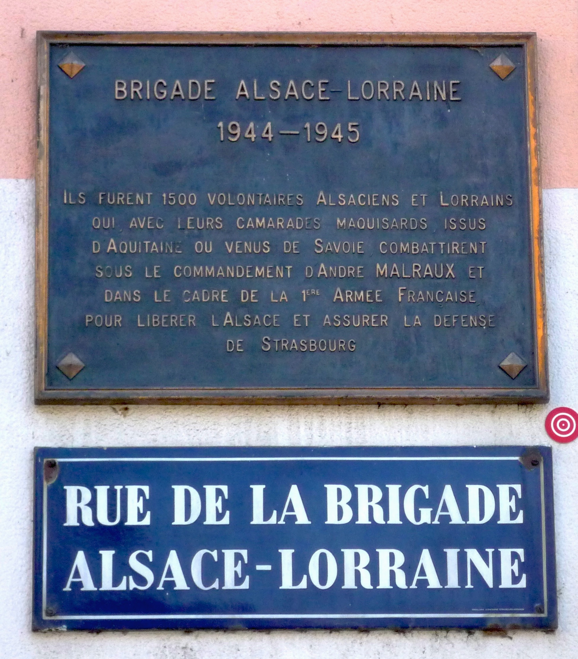 Strasbourg, plaque commémorative de Brigade Alsace Lorraine, 1944-1945.